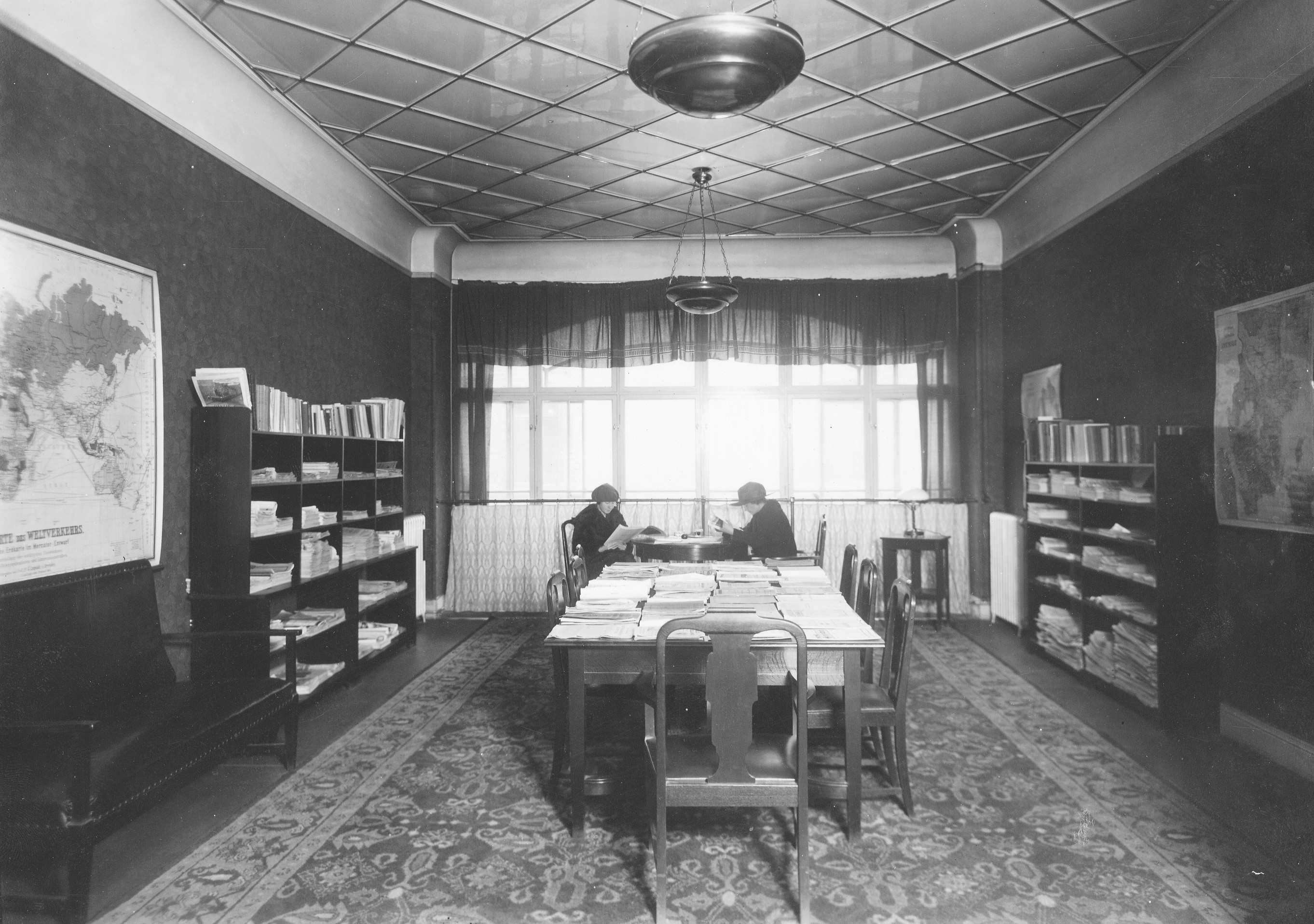 Franska handelskammaren, lässal, Drottninggatan 57